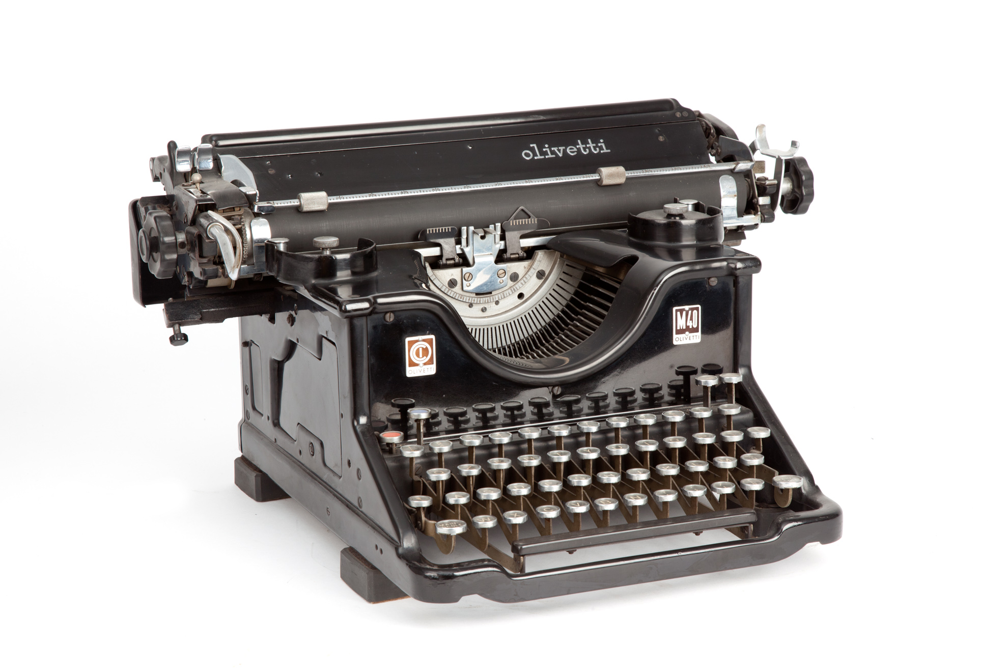 Il modello M40 della Olivetti apparve agli inizi degli anni '30 e rimase in produzione fino al termine della Seconda Guerra Mondiale. Esistono diverse versioni di questa macchina, che si distinguono dal diverso modello del carrello portarullo. La M40 deriva dal perfezionamento del precedente modello M20 ed era particolarmente nota per la nitidezza di scrittura e la grande costanza dell'allineamento. Si tratta della seconda serie di M40 con la superficie zigrinata, prodotta tra il 1938 e il 1946. Questa macchina ha fatto parte del patrimonio strumentale del Museo Nazionale della Scienza e della Tecnologia "Leonardo da Vinci" fino alla decisione della sua rivalutazione come bene museale all'interno del patrimonio storico.